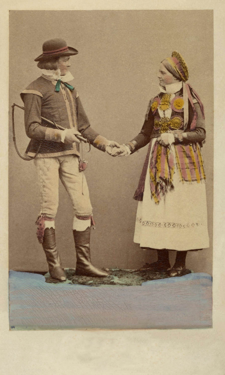 Dräktdockor med huvuden skulpterade av C. A. Söderman, visade på världsutställningen i Wien 1873. Par i dräkter från Herrestad, Skåne. Handkolorerad.